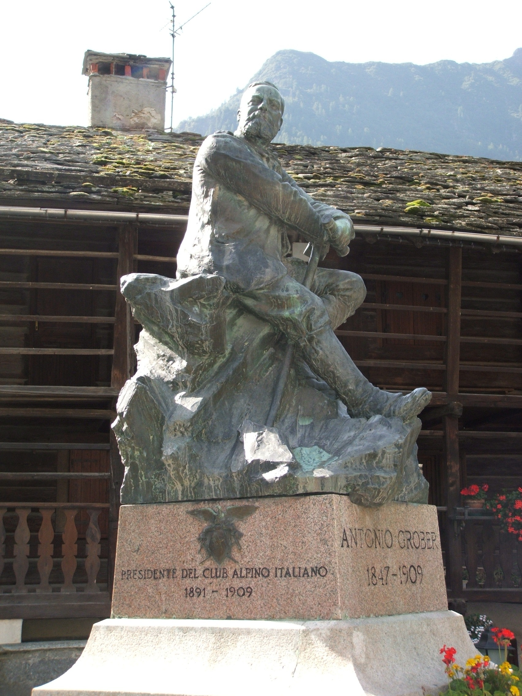 Immagine da Alagna Valsesia